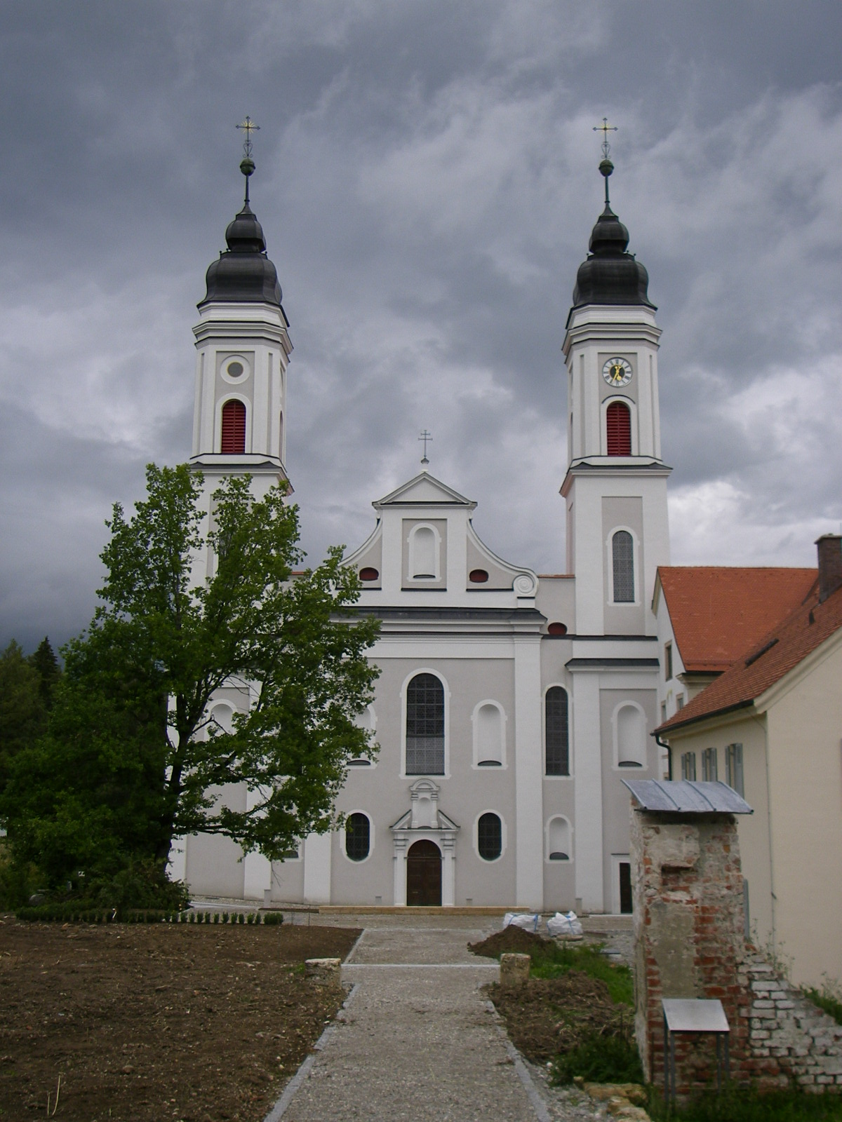 Kirche des ehemaligen Klosters Irsee, Allgäu, Deutschland picture taken by user Alraune on 27.8.2006